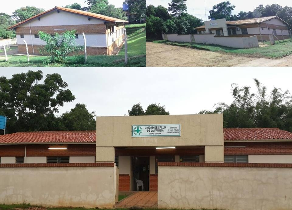 La construcción de la UFS (Unidad Familiar de Salud) de Itapé con acompañamiento del MSPyBS, cuenta con todas las comodidades y servicios básicos